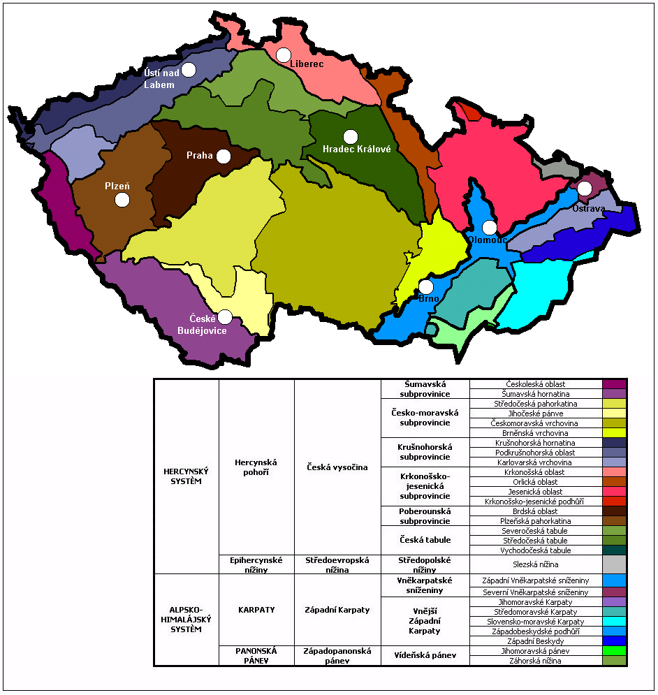 Geomorphologische EInteilung Tschechiens